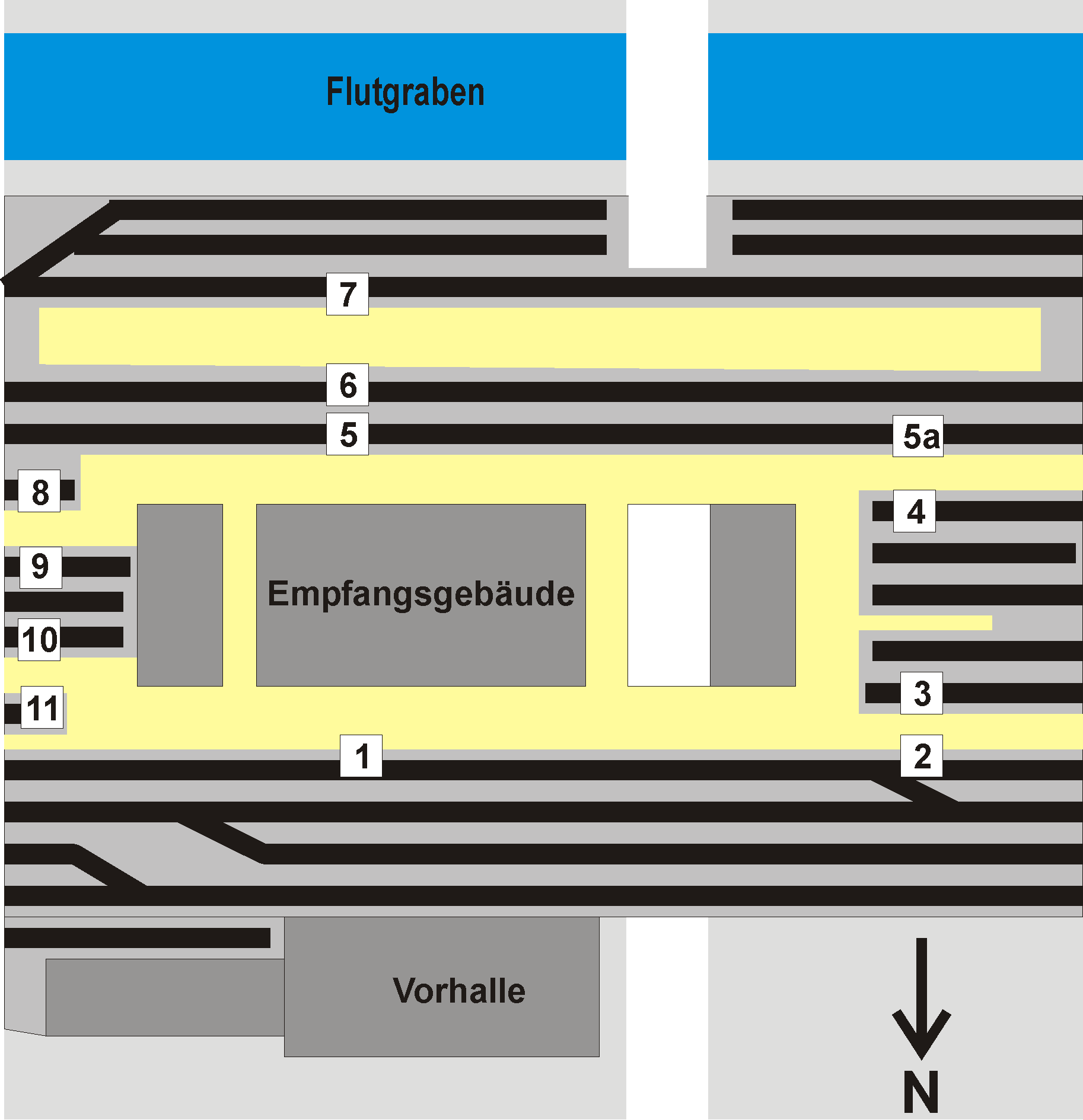 Bahnsteignummern Hbf. Erfurt Diese Skizze zeigt schematisiert die Lage der Gleise im Hauptbahnhof Erfurt sowie die Bahnsteignummern von 1975 bis 2005.